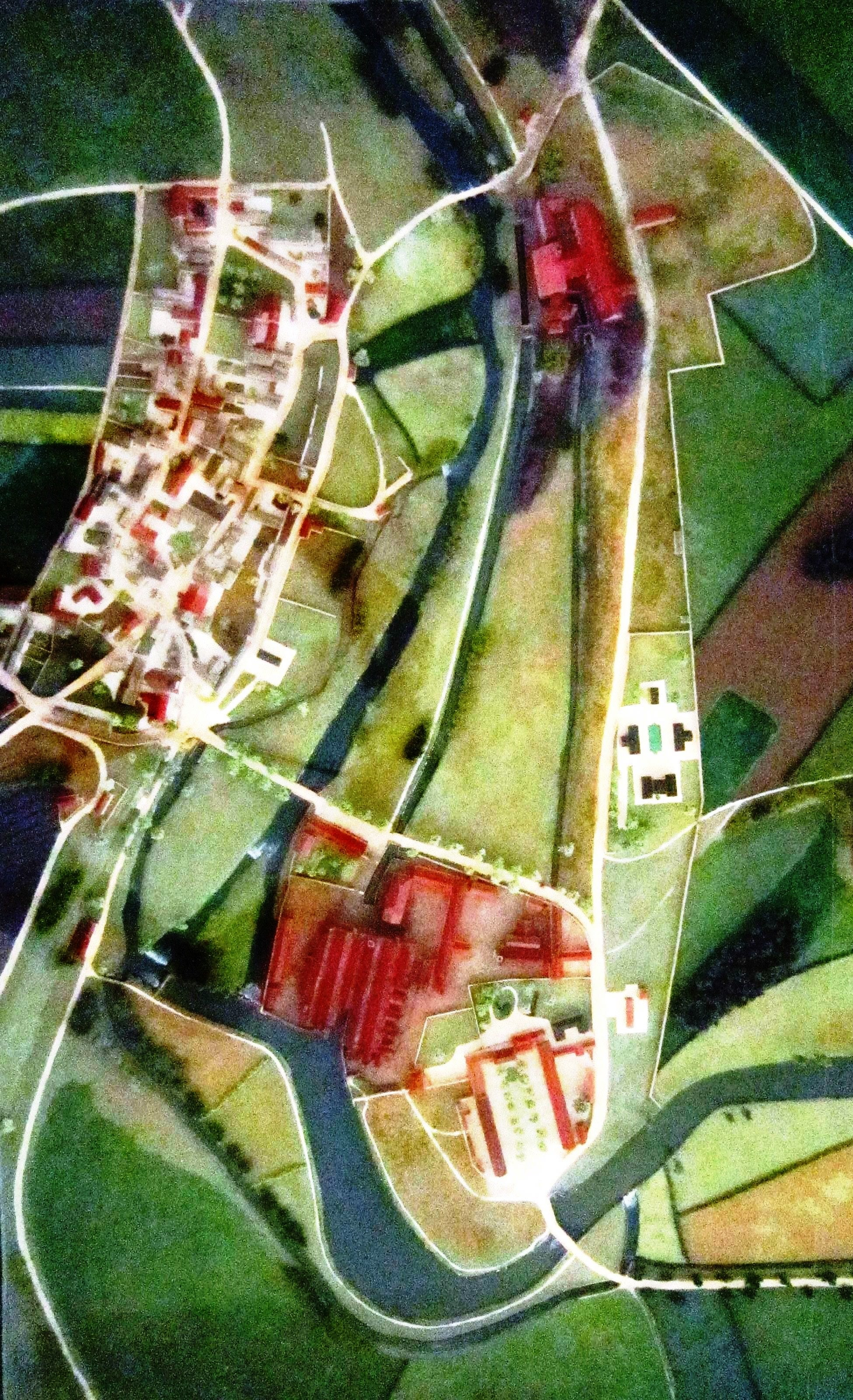 Maquette de la forge Marmont vers 1840 : l'actuel cours Marmont (à droite) et le bourg (à gauche).